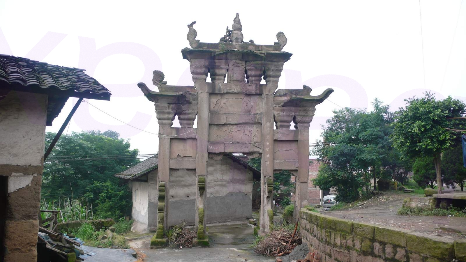 重慶府綦江縣古劍羅氏節孝牌坊